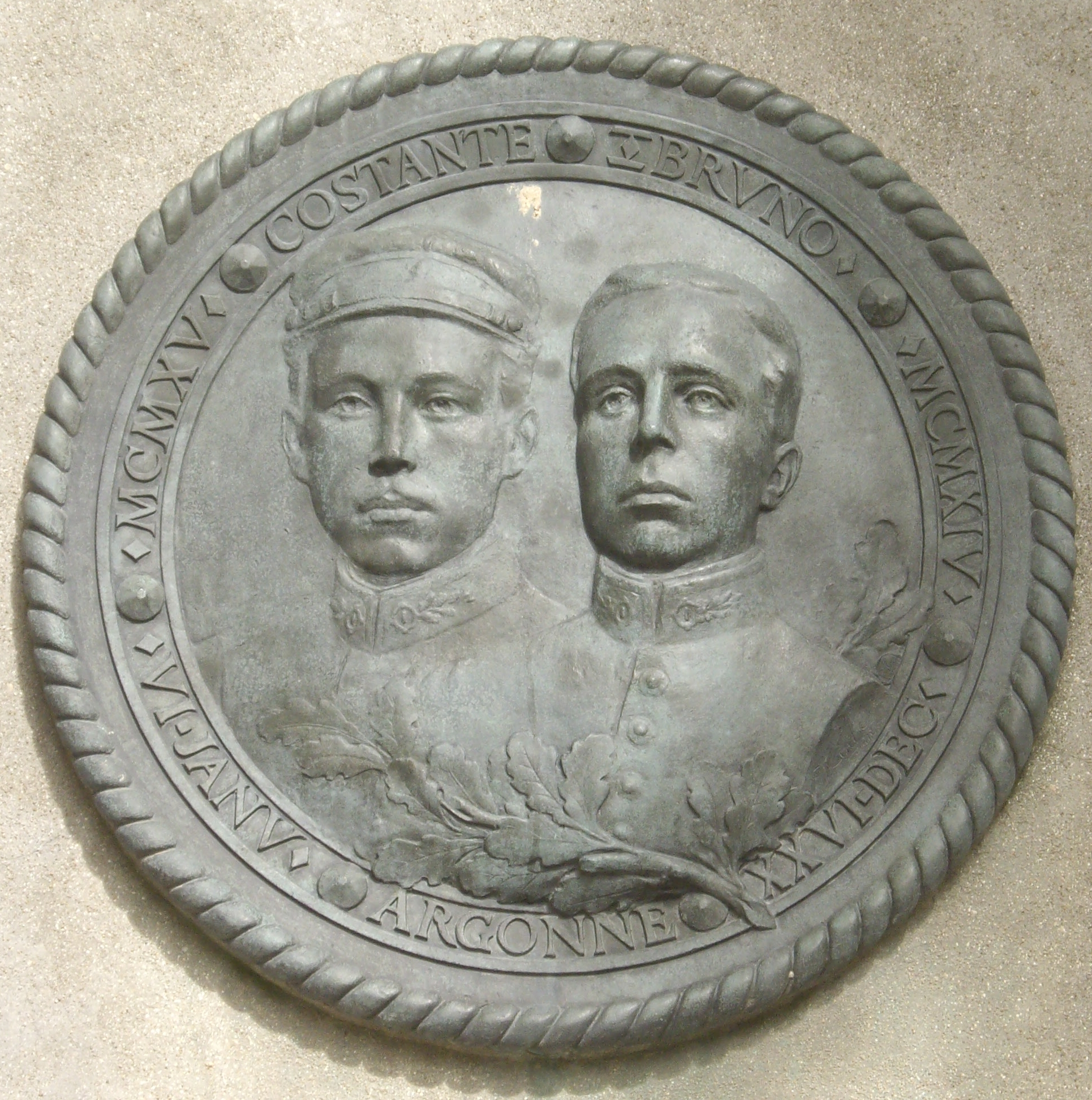 Costante et Bruno Garibaldi, square Garibaldi, Paris 15e. Médaillon en bronze (1917) par Vincenzo Cochi (1855-19..).